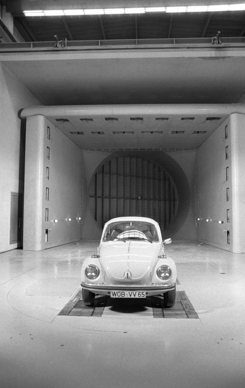 VW-Werk, Wolfsburg Forschung und Entwicklungsabteilung